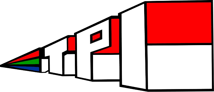 Logo Televisi TPI 1991